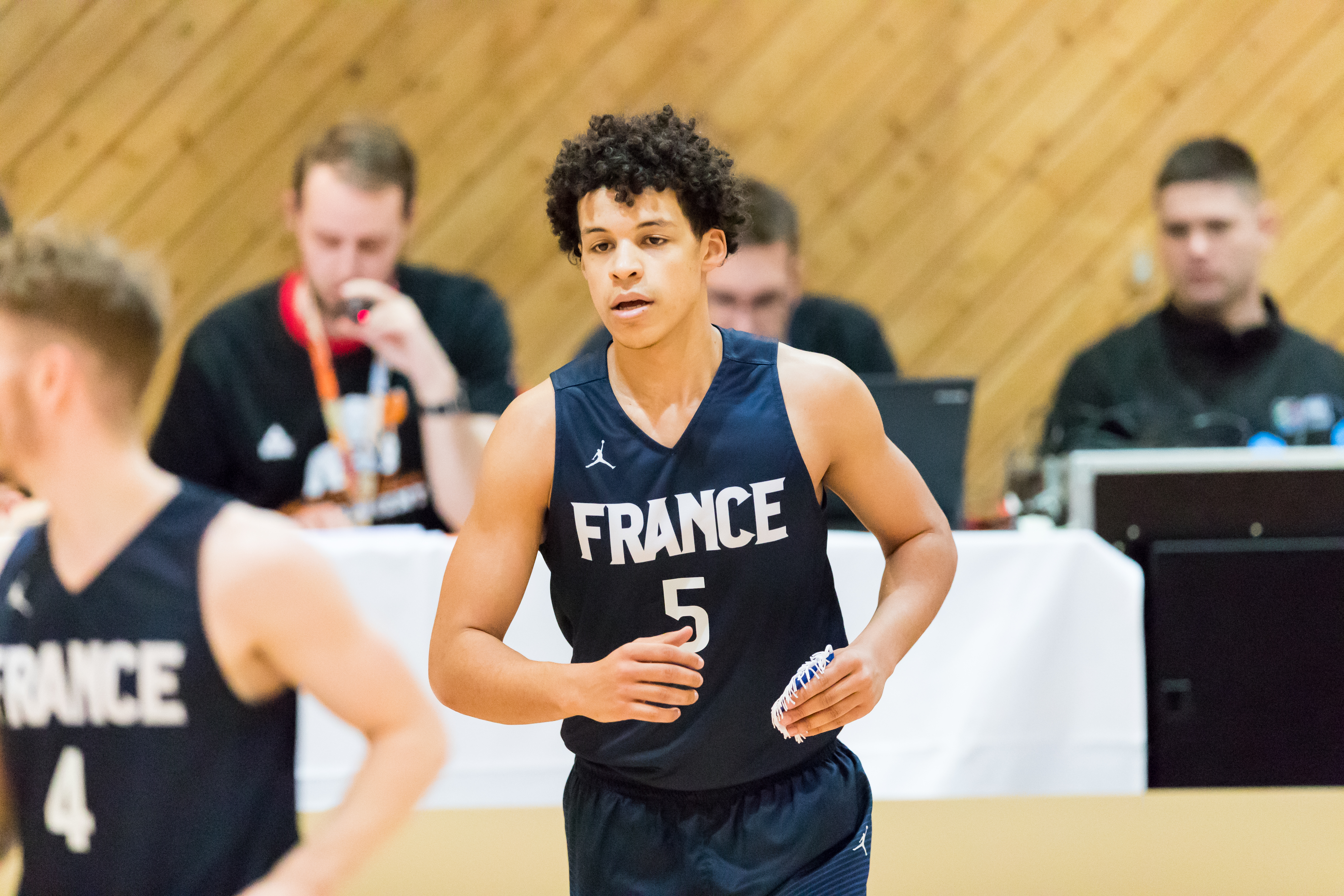 USA vs France 73:79 during Basketball Albert Schweitzer Turnier at Waldsporthalle, Viernheim, Hessen, Germany on 2018-03-31, Photo: Sven Mandel